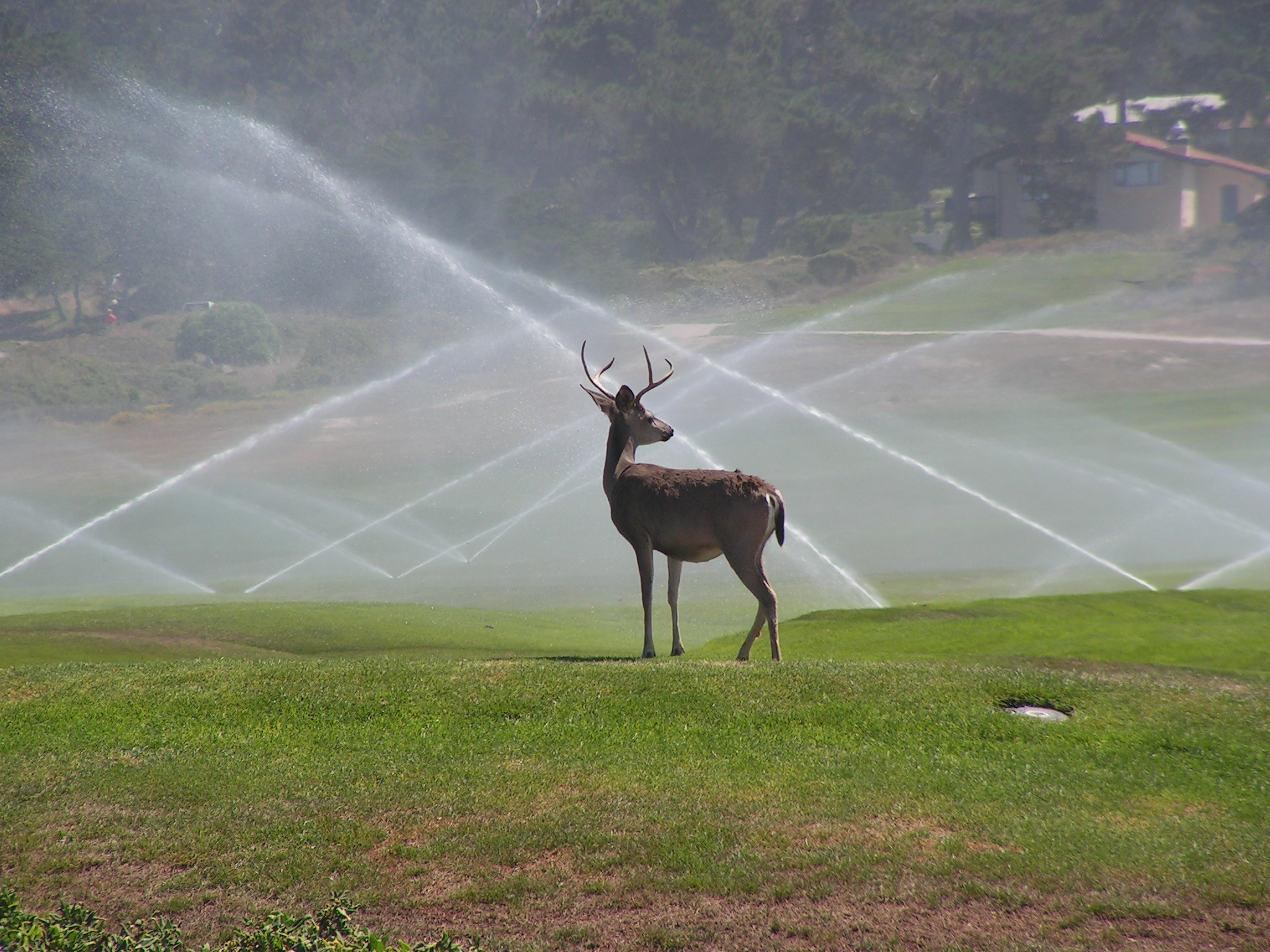 Pebble Beach